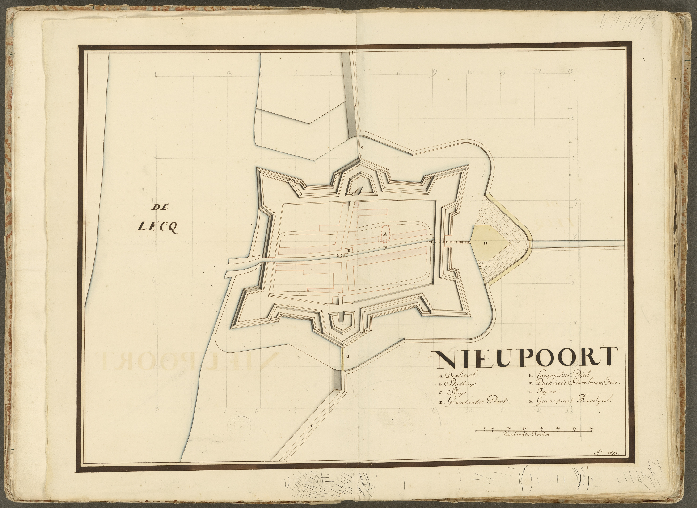 Plattegrond van de vesting Nieuwpoort. Deze kaart komt uit de collectie van het Nationaal Archief, inventarisnummer 4 VTHR 652.